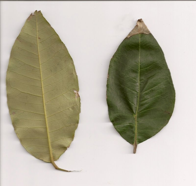 Choricarpia leptopetala, leaves